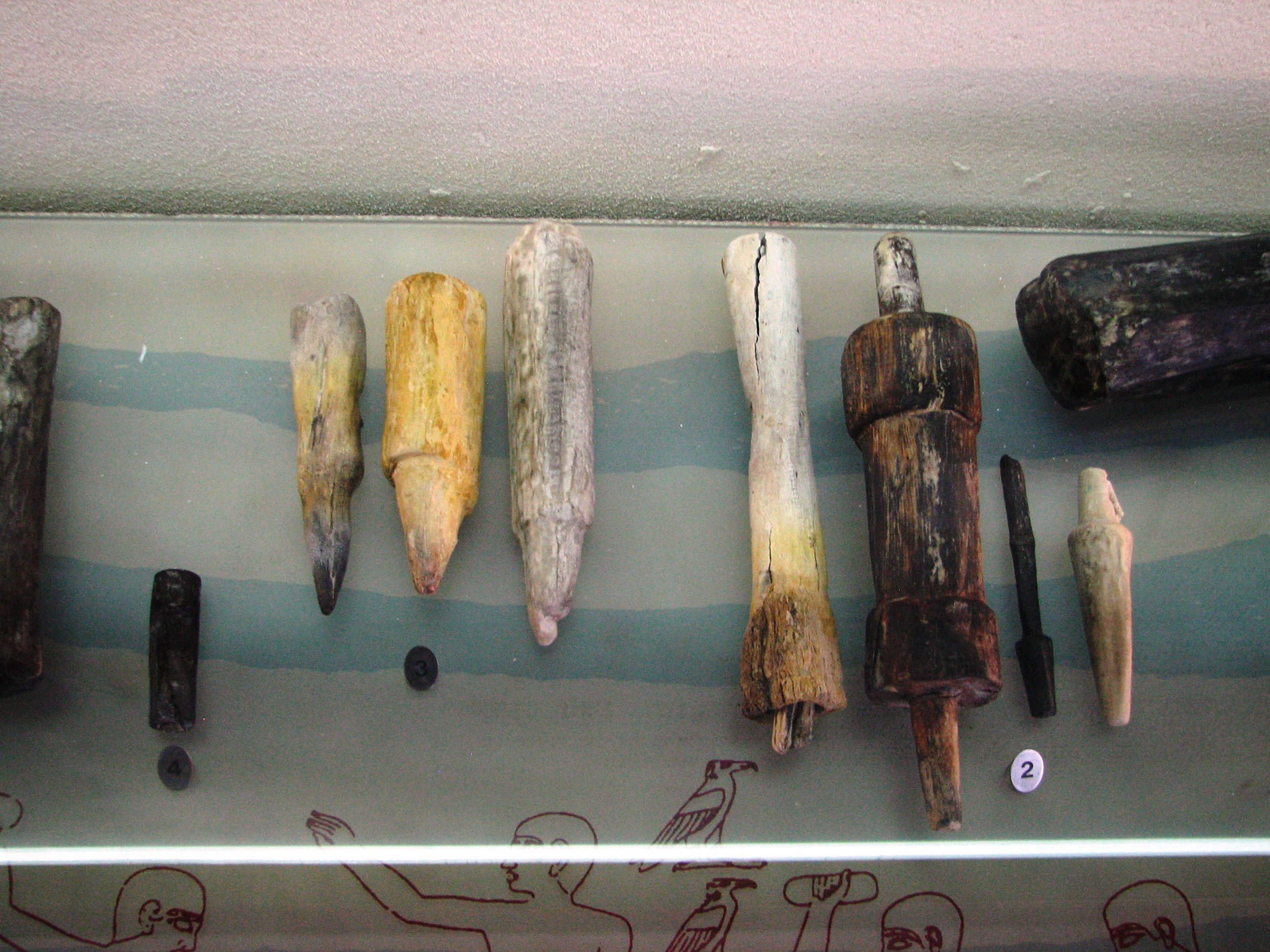 The Ma'agan Michael Ship is a 5th-century BC merchantman discovered off the coast of Ma'agan Michael, Israel, in 1985. הספינה העתיקה ממעגן מיכאל, היא ספינת סוחר פניקית מעץ מסוף המאה החמישית לפנה"ס שהתגלתה ב-1985 בים במרחק 70 מטר מחוף קיבוץ מעגן מיכאל בעומק של שני מטר מתוך ערכת כלי הנגר - מס' 2 חלקי מקדחות קשת, מס' 3 דקרים, מס' 4 ידית מרצע